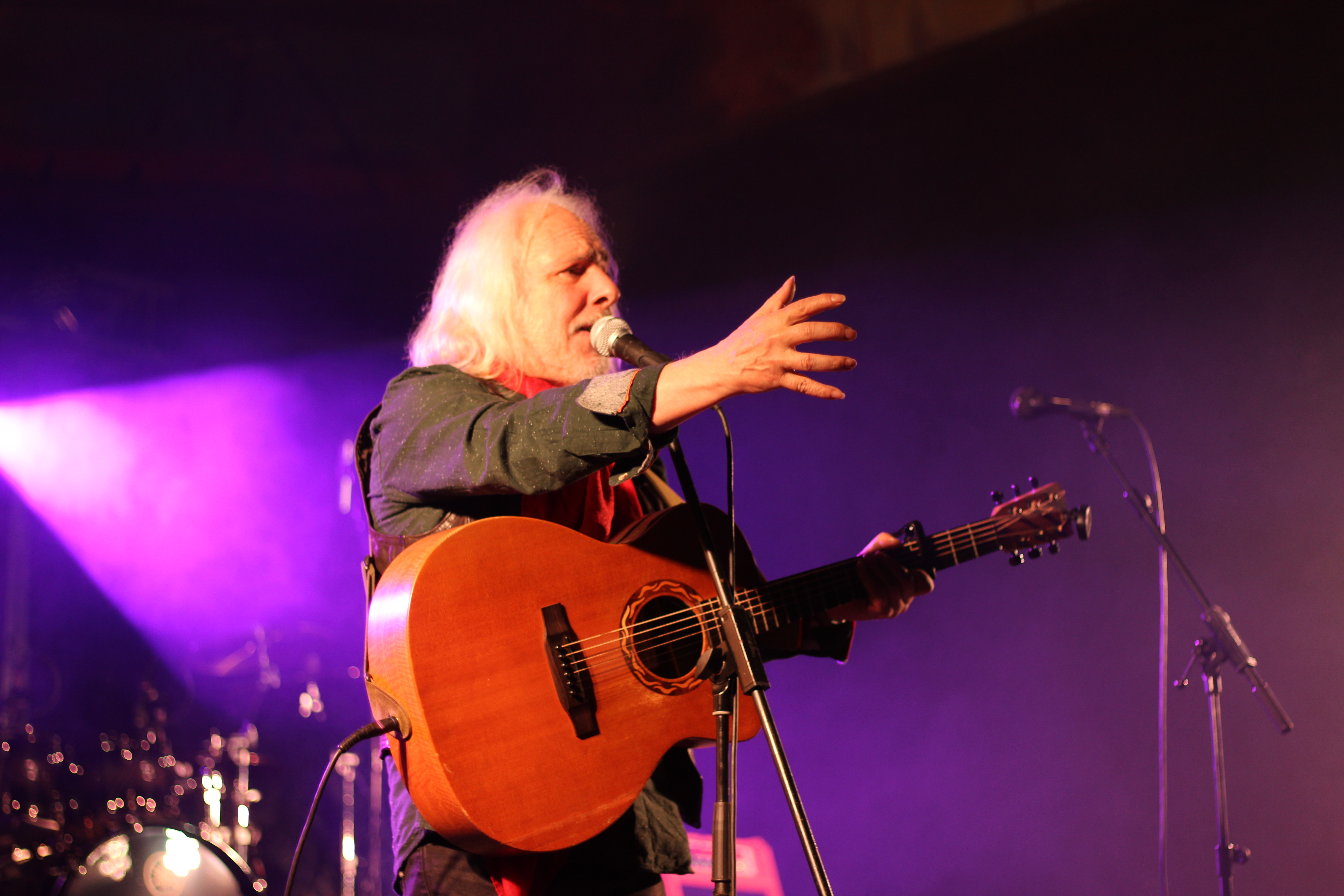 Musikherria Tolosa, 2019/5/25